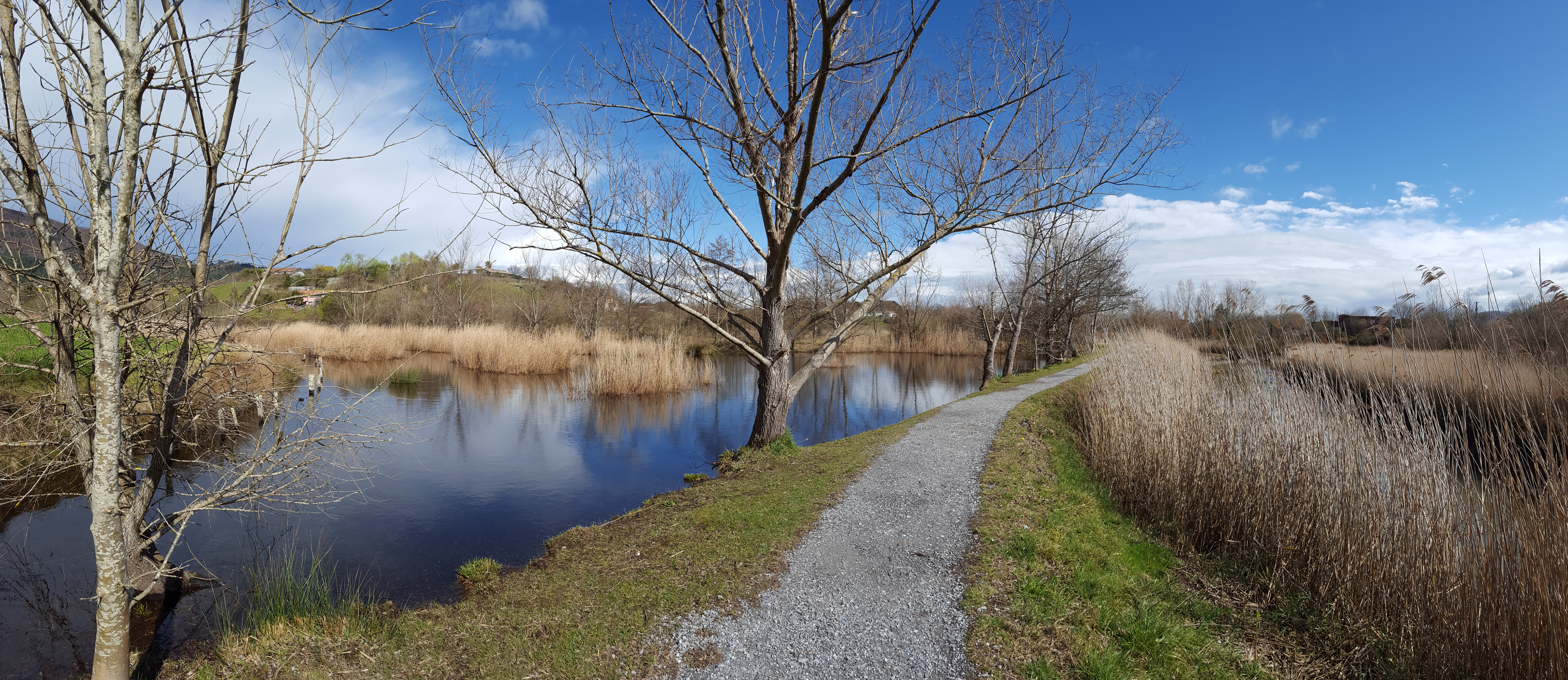 Jaitzubia padura Hondarribian